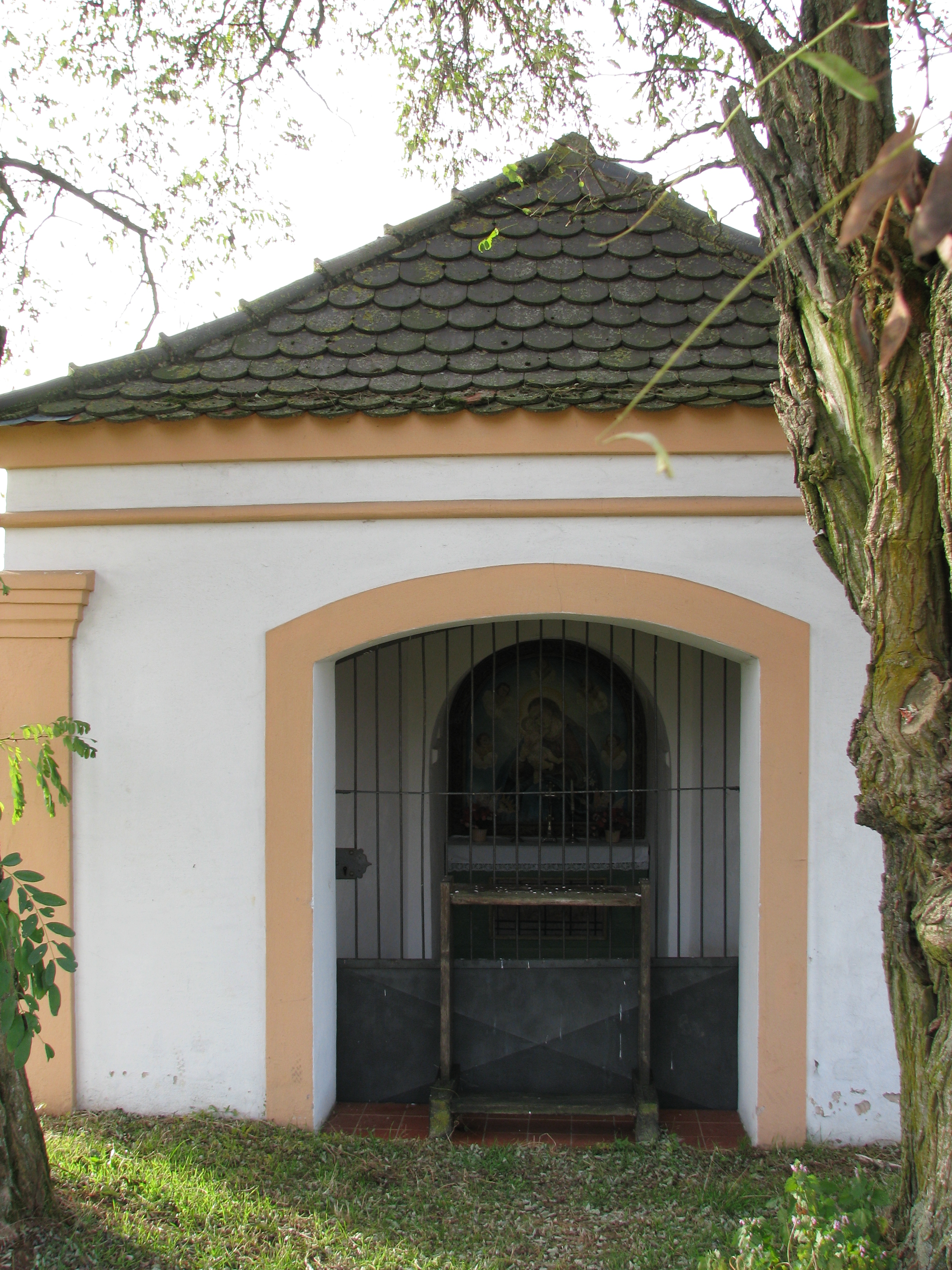 Kleinnottersdorf, Ortsteil der Stadt Greding im mittelfränkischen Landkreis Roth in Bayern, Feldkapelle